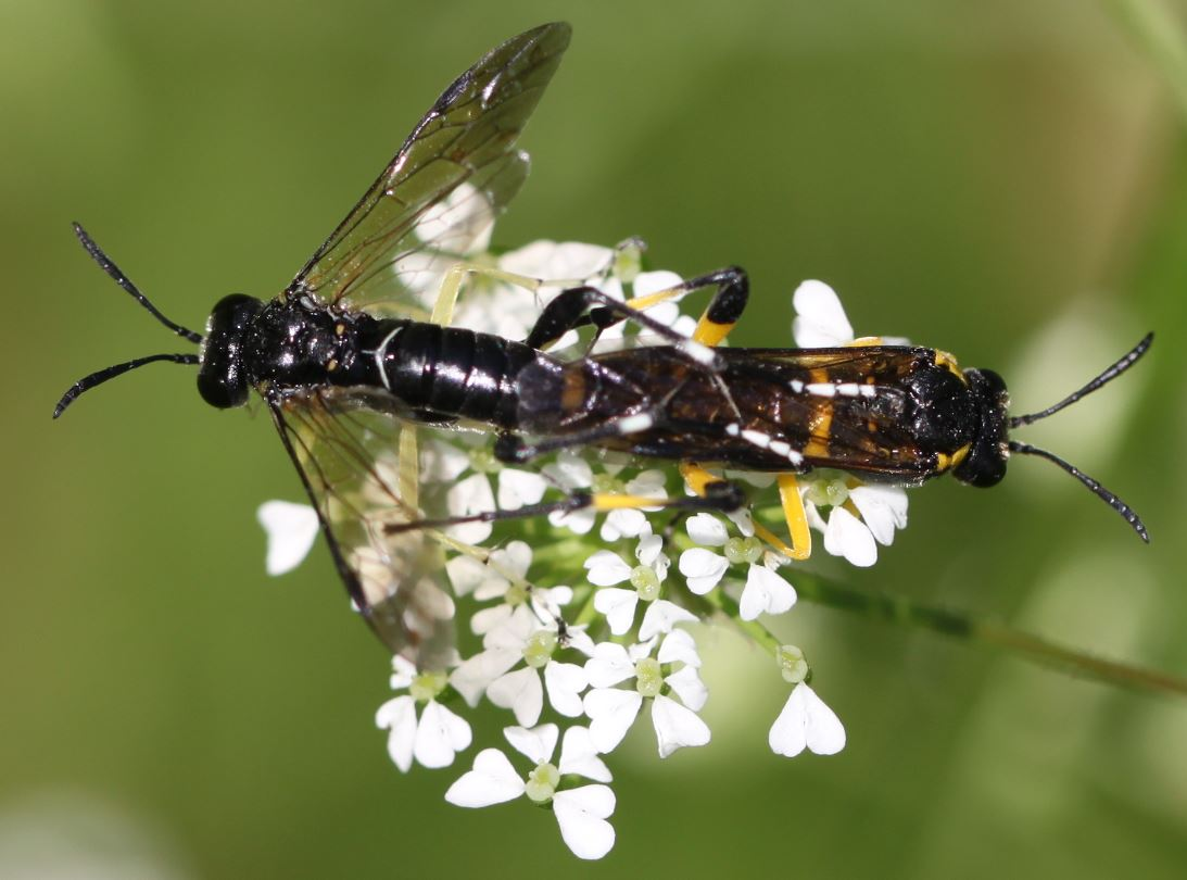 Paarende Bergblattwespen (Macrophya montana), links Männchen, rechts Weibchen, am 24. Mai 2019 in Walldorf/Baden